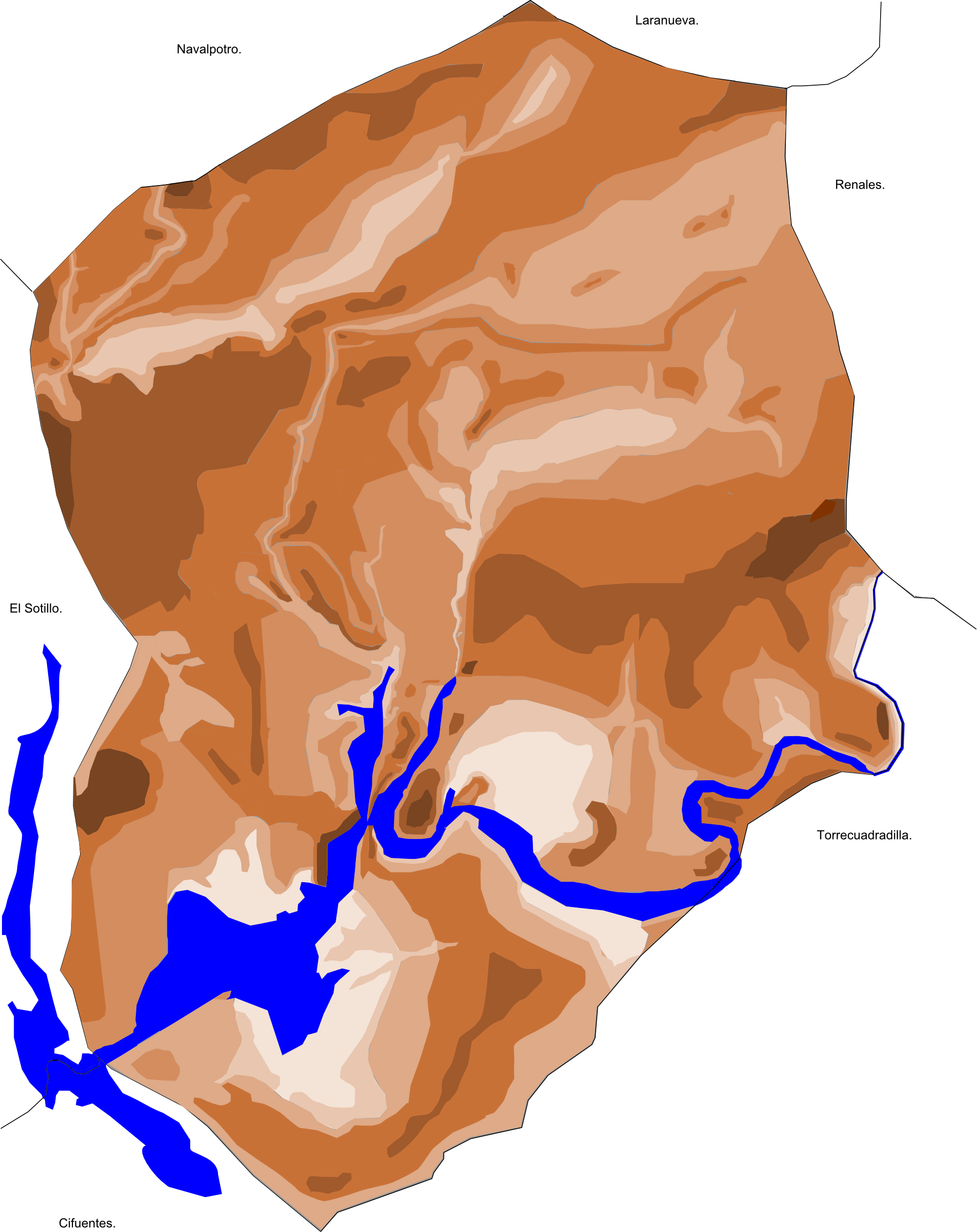 Mapa topográfico del termino municipal de Torrecuadrada de los Valles, provincia de Guadalajara, España.